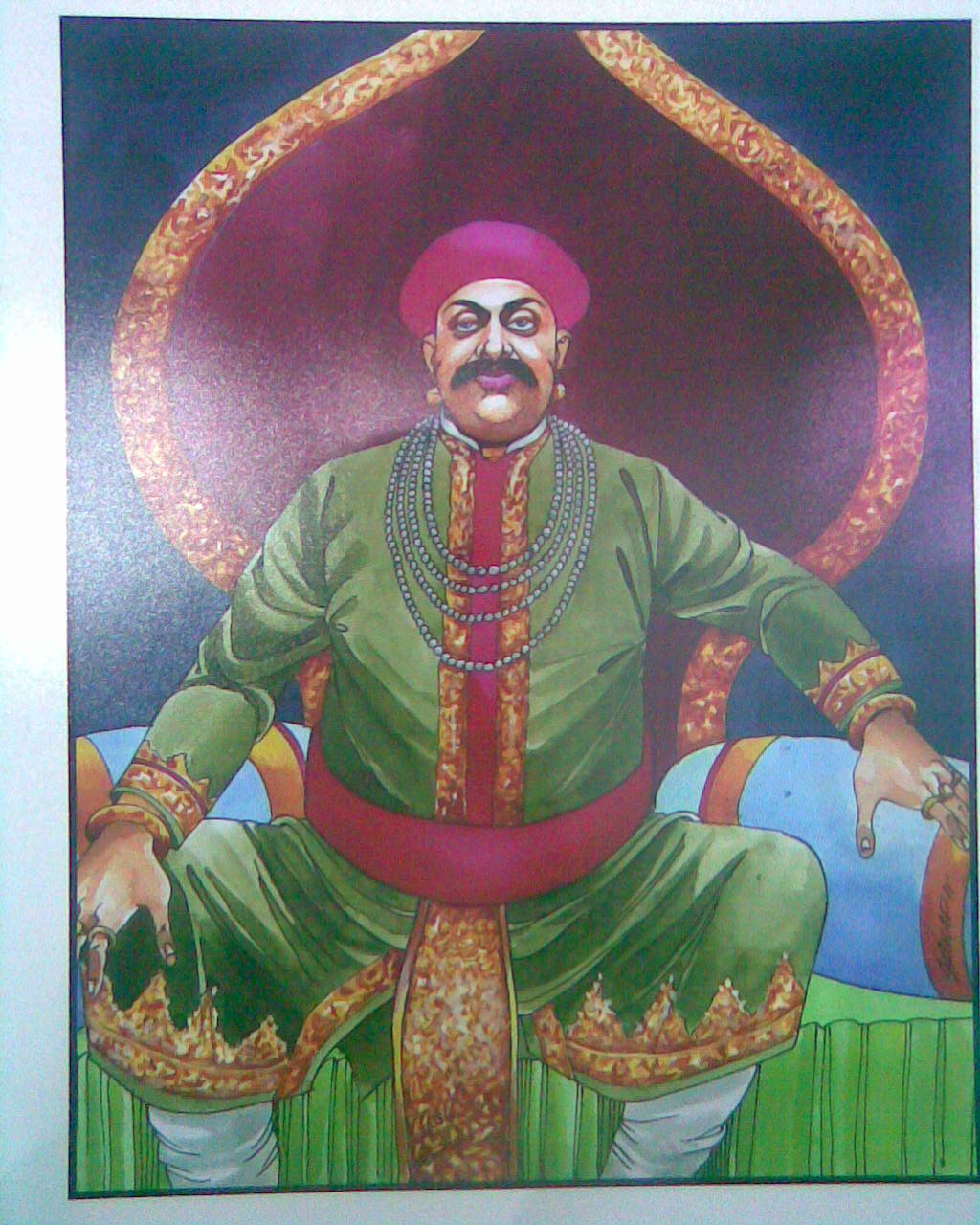 నల సోమనాద్రి